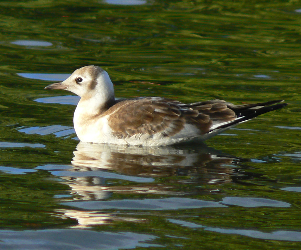 Taken in Regents Park